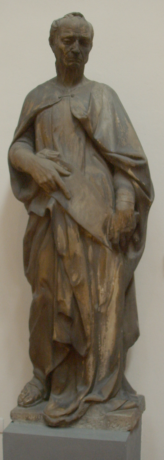 Opera del duomo (FI), donatello, profeta 1416-18